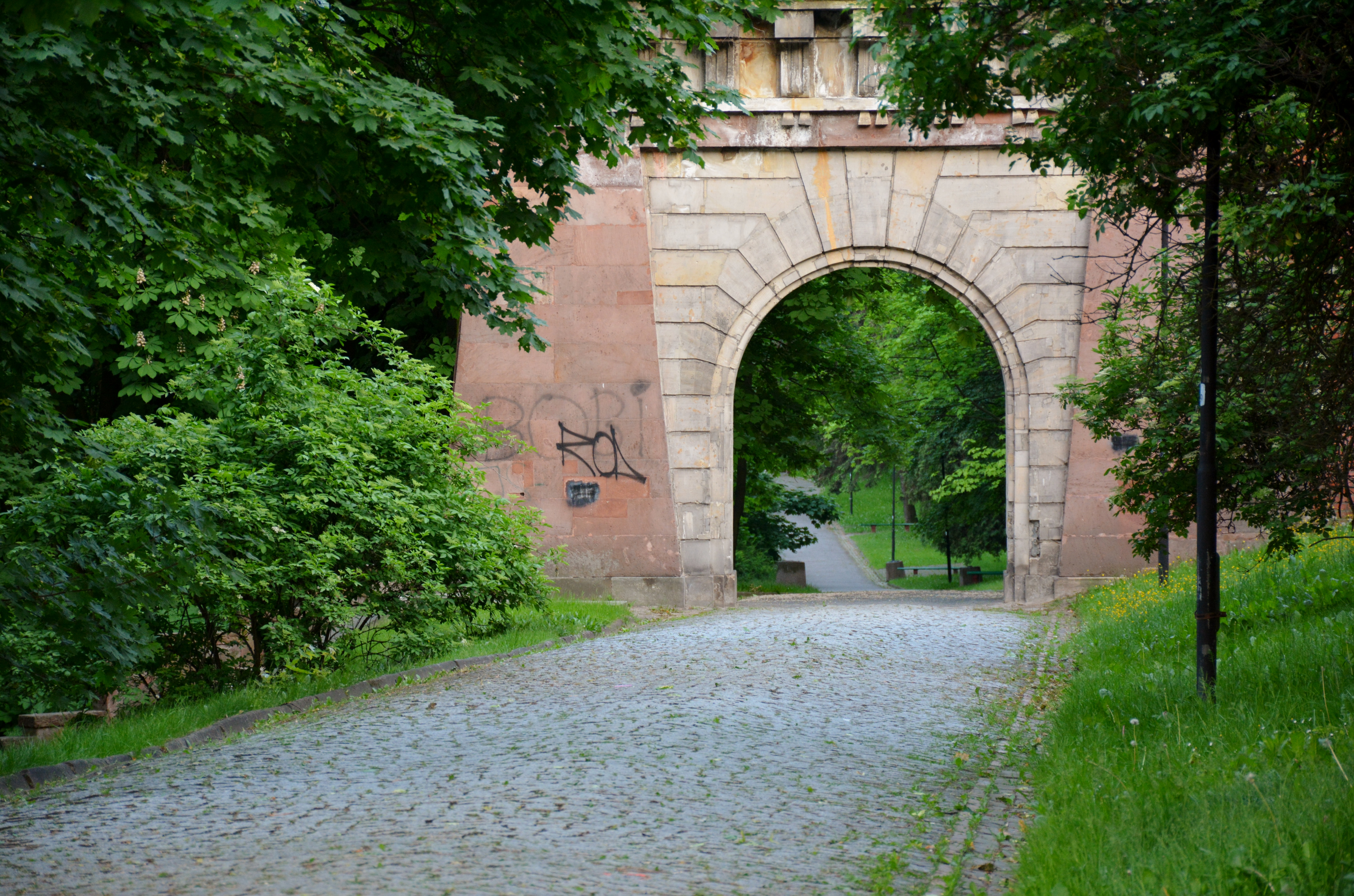 Stary Żoliborz, Warszawa, Poland